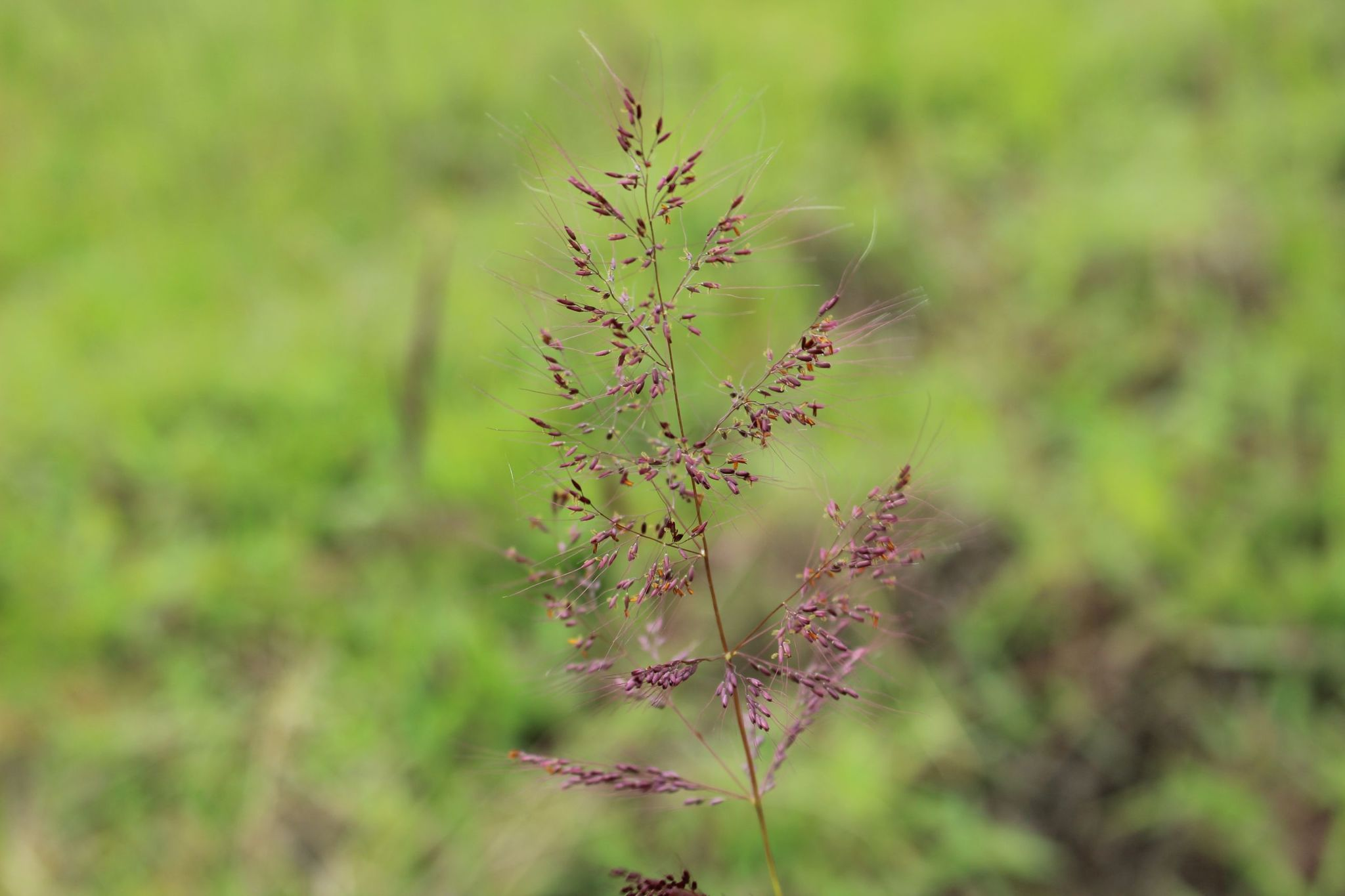 Yaraguá (Melinis minutiflora) en el sendero el Raizal, Duitama, Colombia.